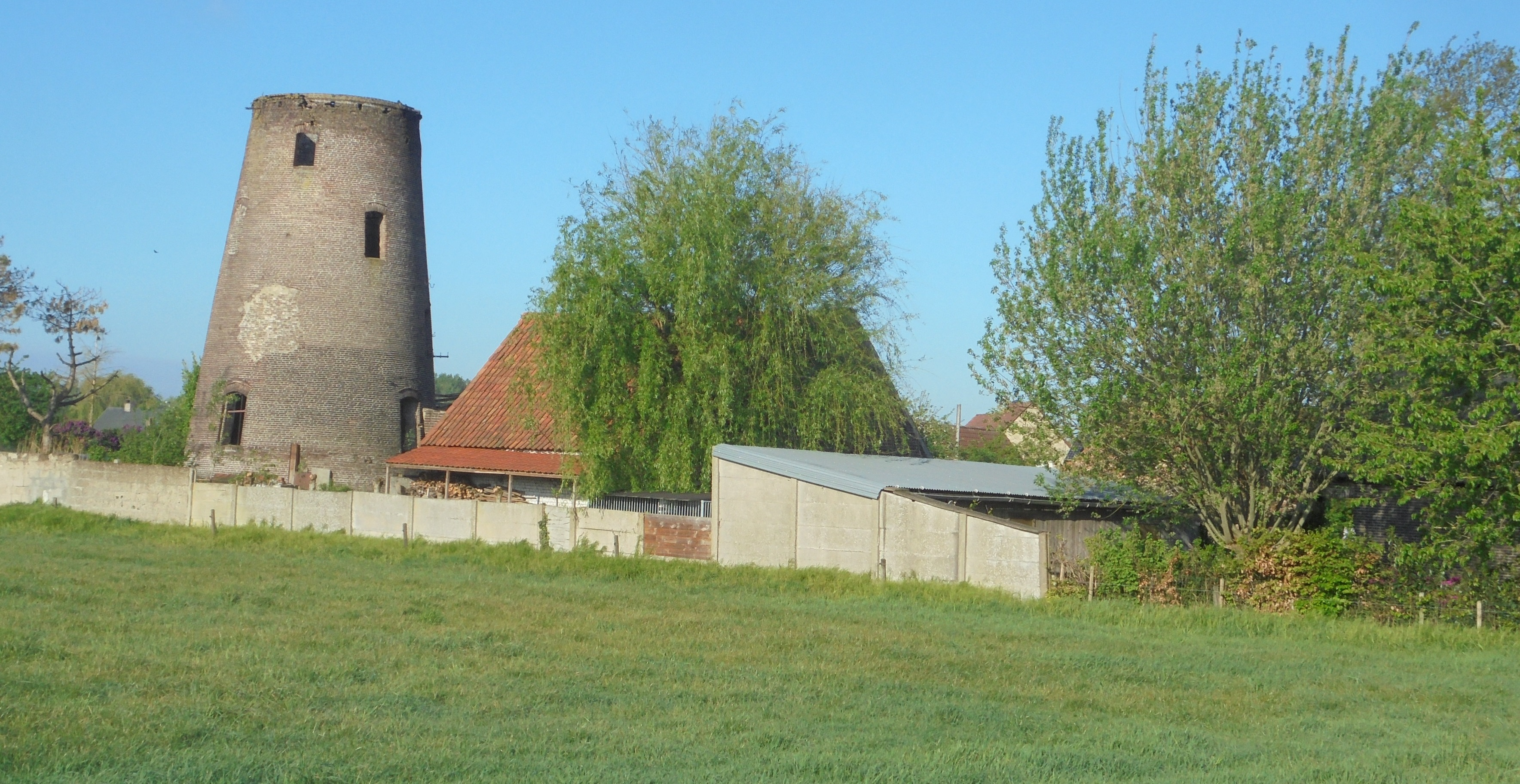 Romp van een windmolen - IJzerenhand - Ursel - Aalter - Oost-Vlaanderen - België